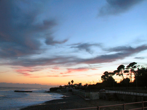 Salvatore Rossitto, Tramonto dal Lungomare di Avola.